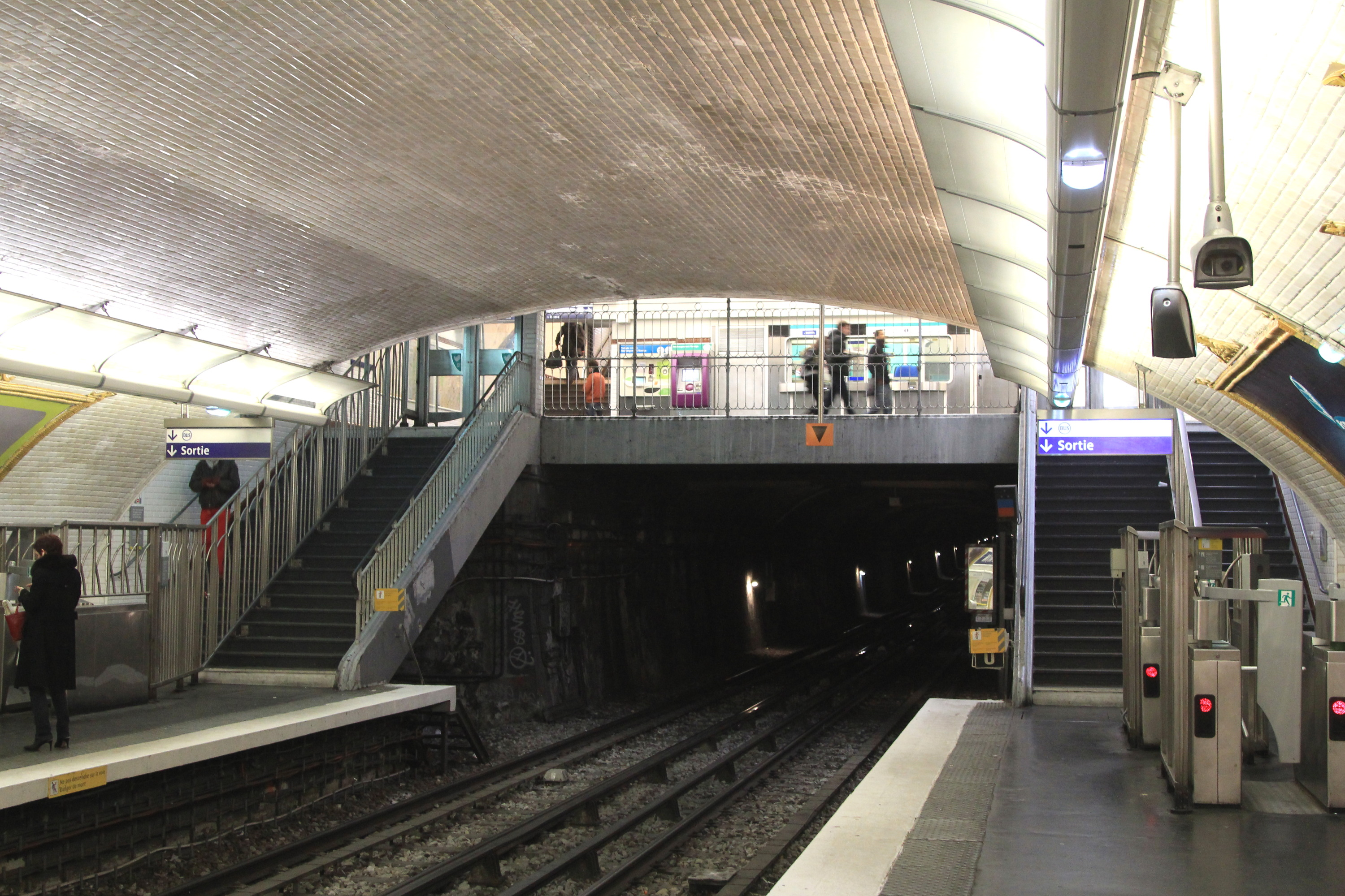 Vue depuis les quais de la mezzanine où est installé le guichet de la station du métro parisien Jasmin.